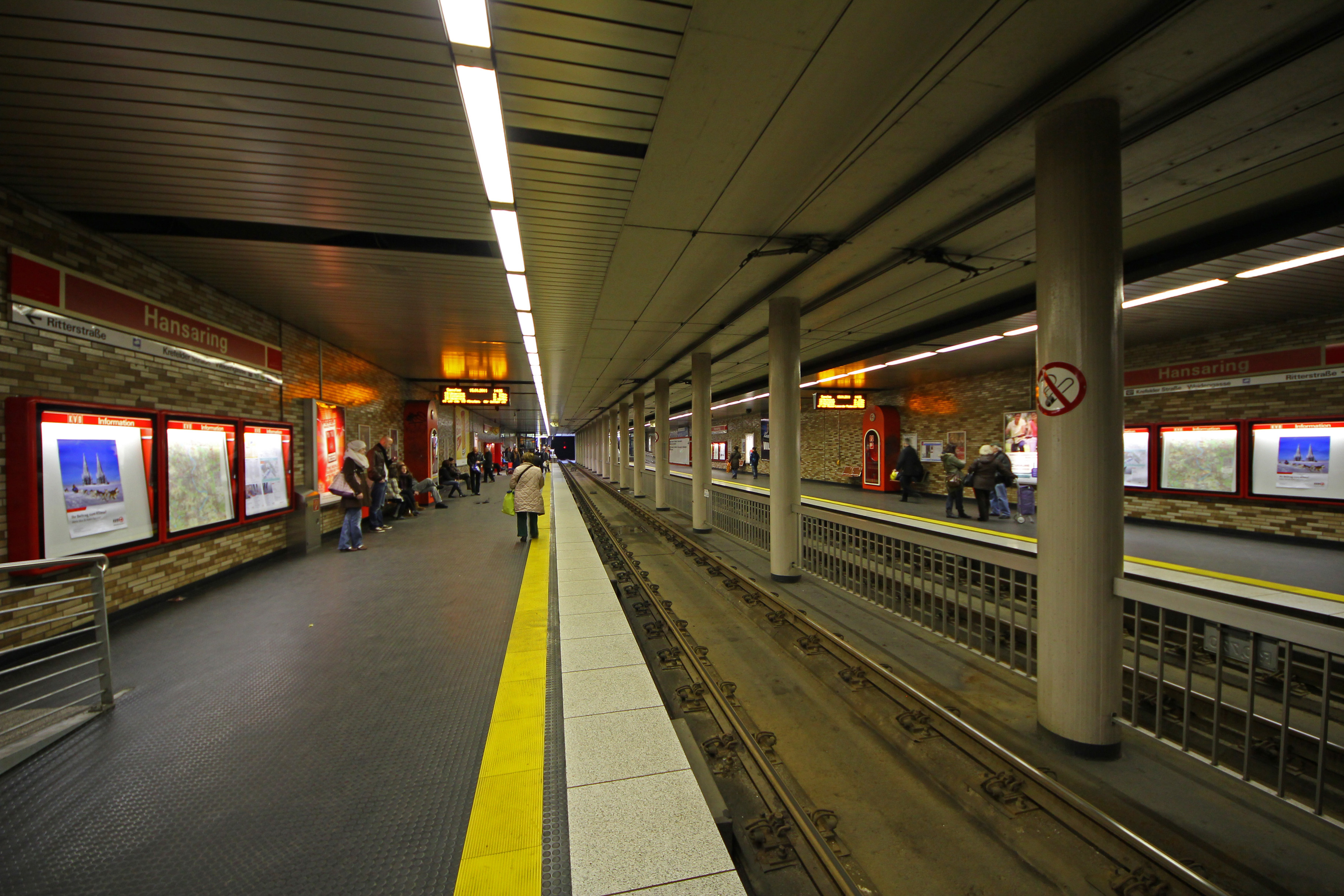 U-Bahn-Station Hansaring in Köln